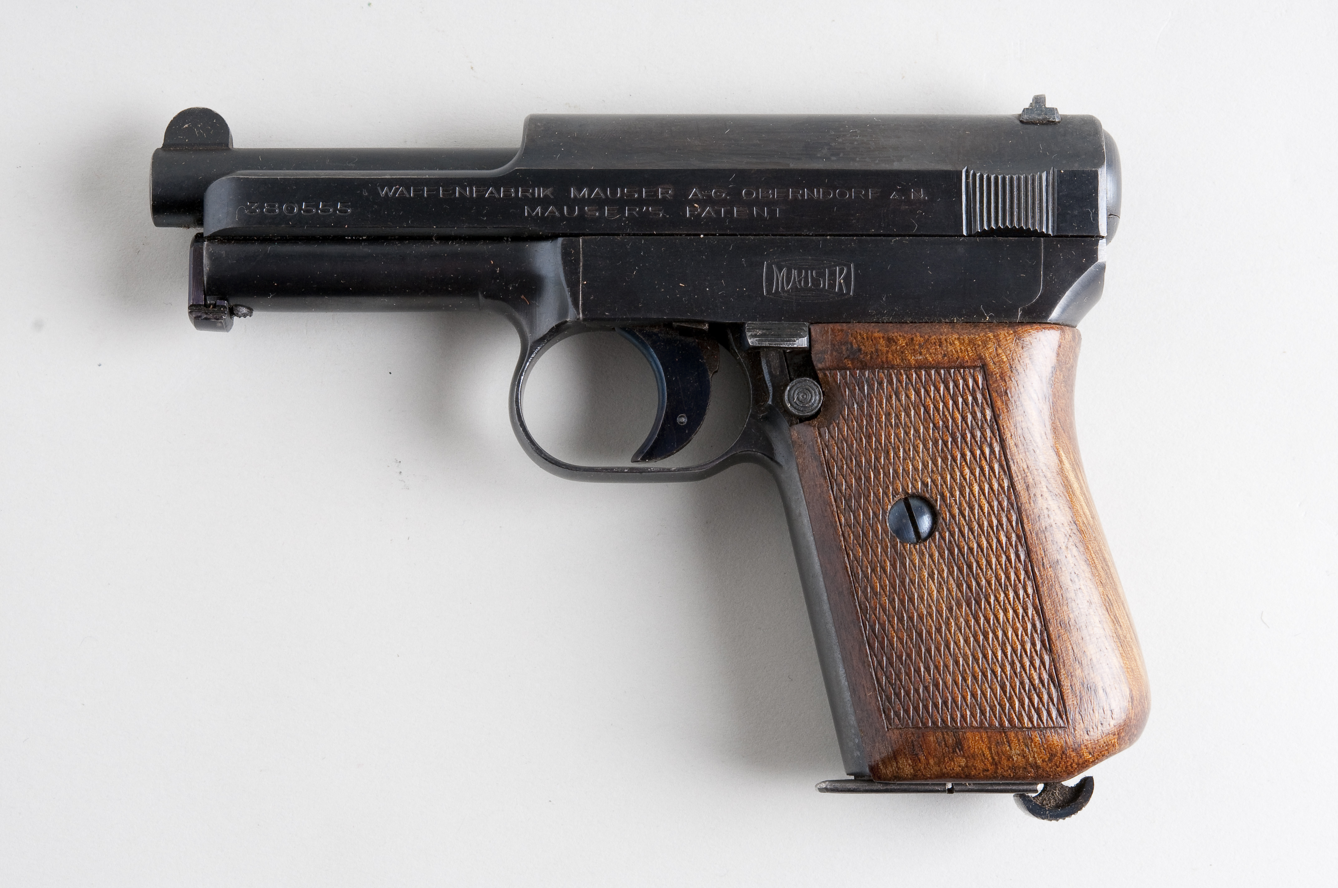 Mauser 1914 From flickr user handvapensamlingen - Pistols used in Norway.